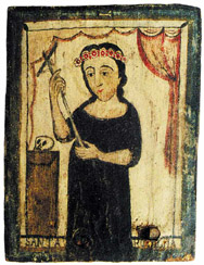 Santa Rosália - ícone votivo